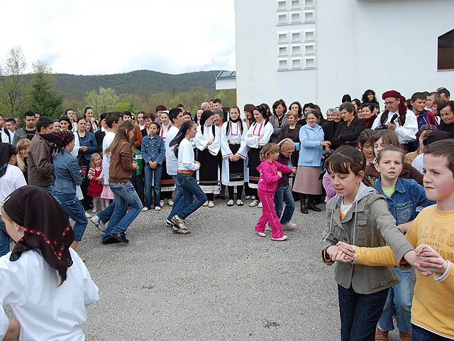 KUD "Brda" u Izbičnu.